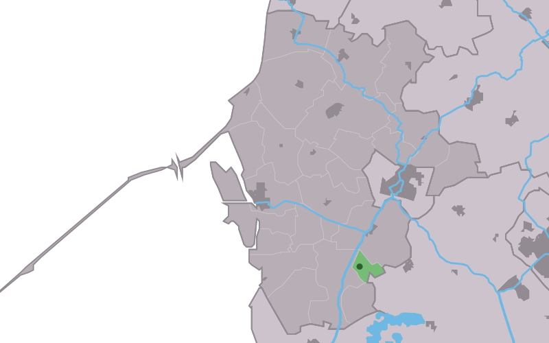 Kaartsje fan himrik fan Dedzjum